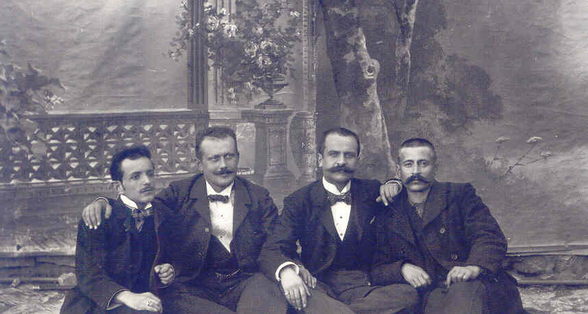 Καστοριά: 1903, ο Δημήτριος Γκολίτσης (πρώτος από δεξιά) δίπλα στον φιλόλογο-λαογράφο Παντελή Τσαμίση και δυο άλλους καθηγητές του Ελληνικού Γυμνασίου Καστοριάς (Φωτ,Αρχείο Λ.Παπάζογλου) My grandfather Demetrious Golitsis first from right